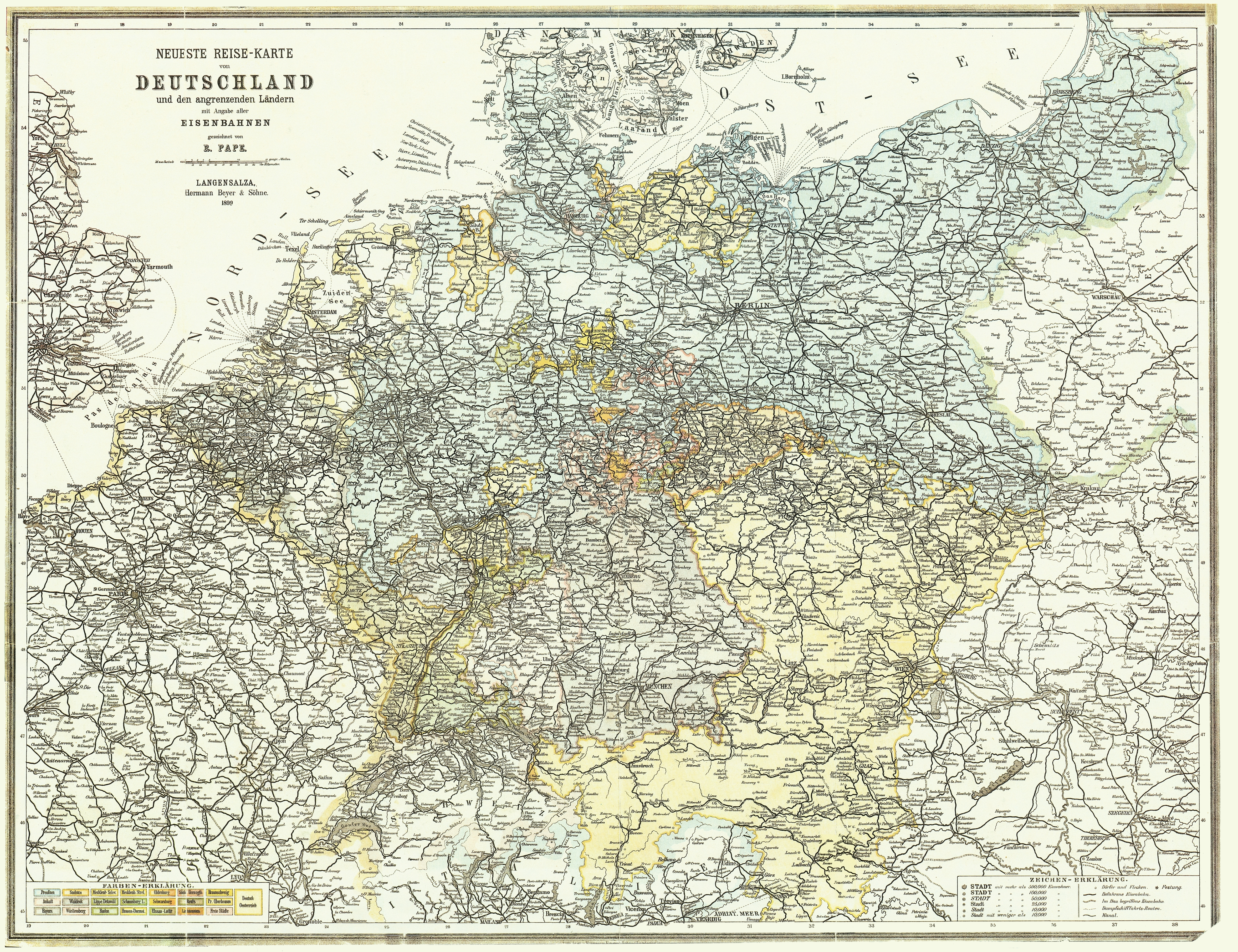 Bahnkarte_Deutschland_1899